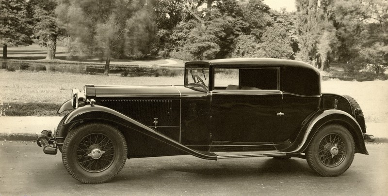 Lancia carrossée par Pourtout